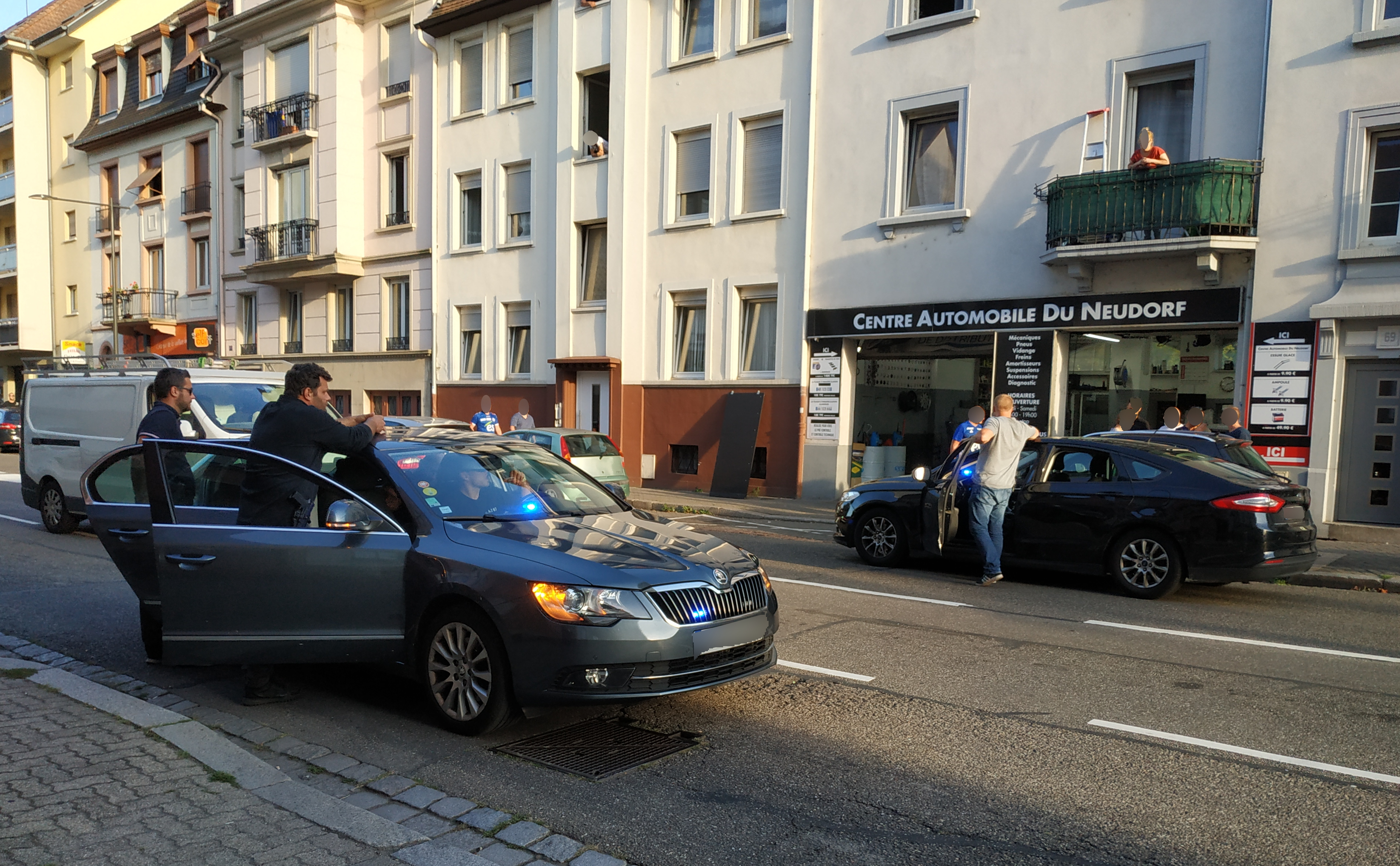 Intervention de la brigade anti-criminalité (BAC 67) aux abords de Krimmeri-Stade de la Meinau, lors du match Racing-Eintracht Francfort à Strasbourg (22 août 2019)